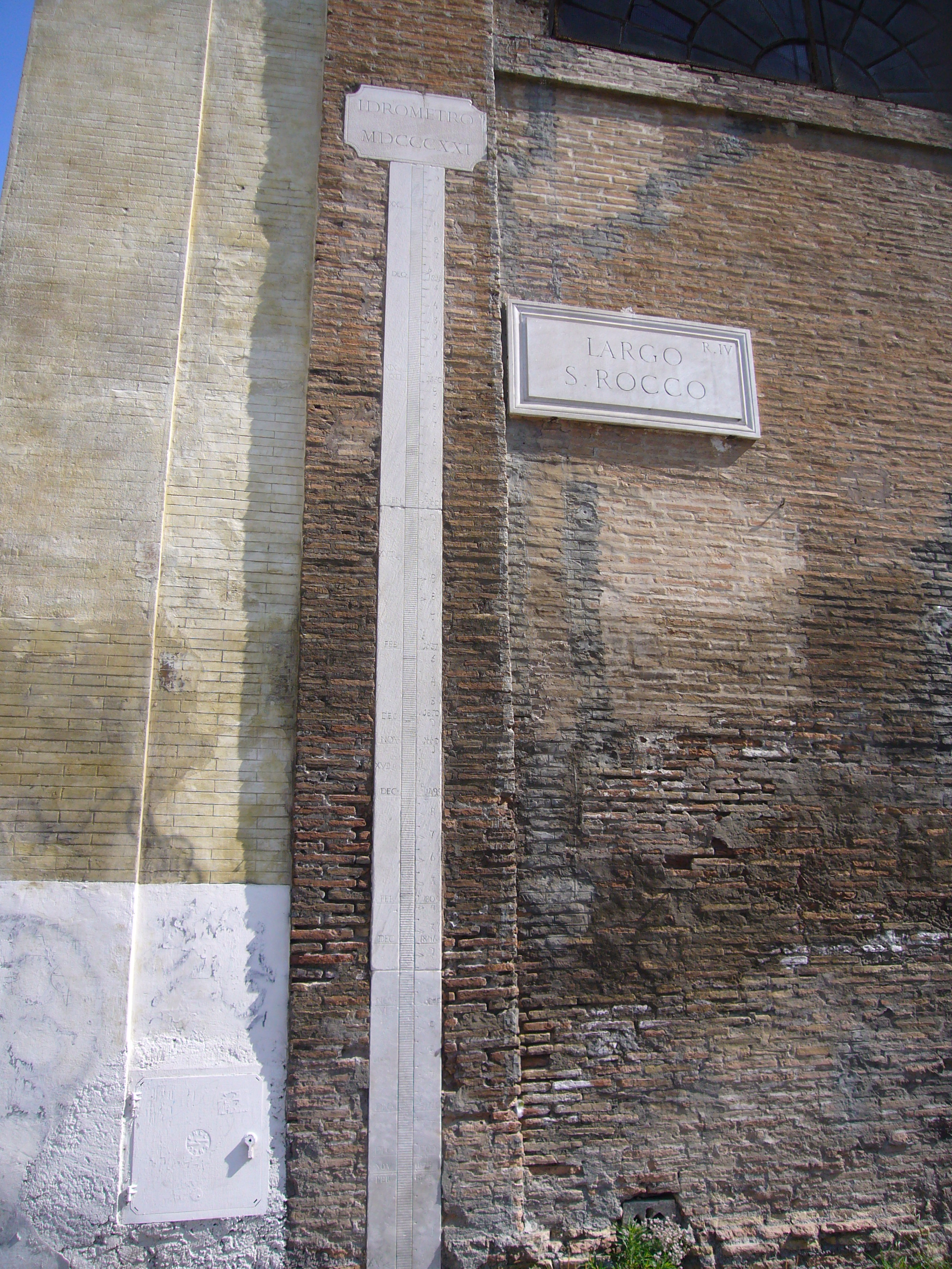 Roma, largo san Rocco a Ripetta: idrometro del 1821 con le piene del Tevere.